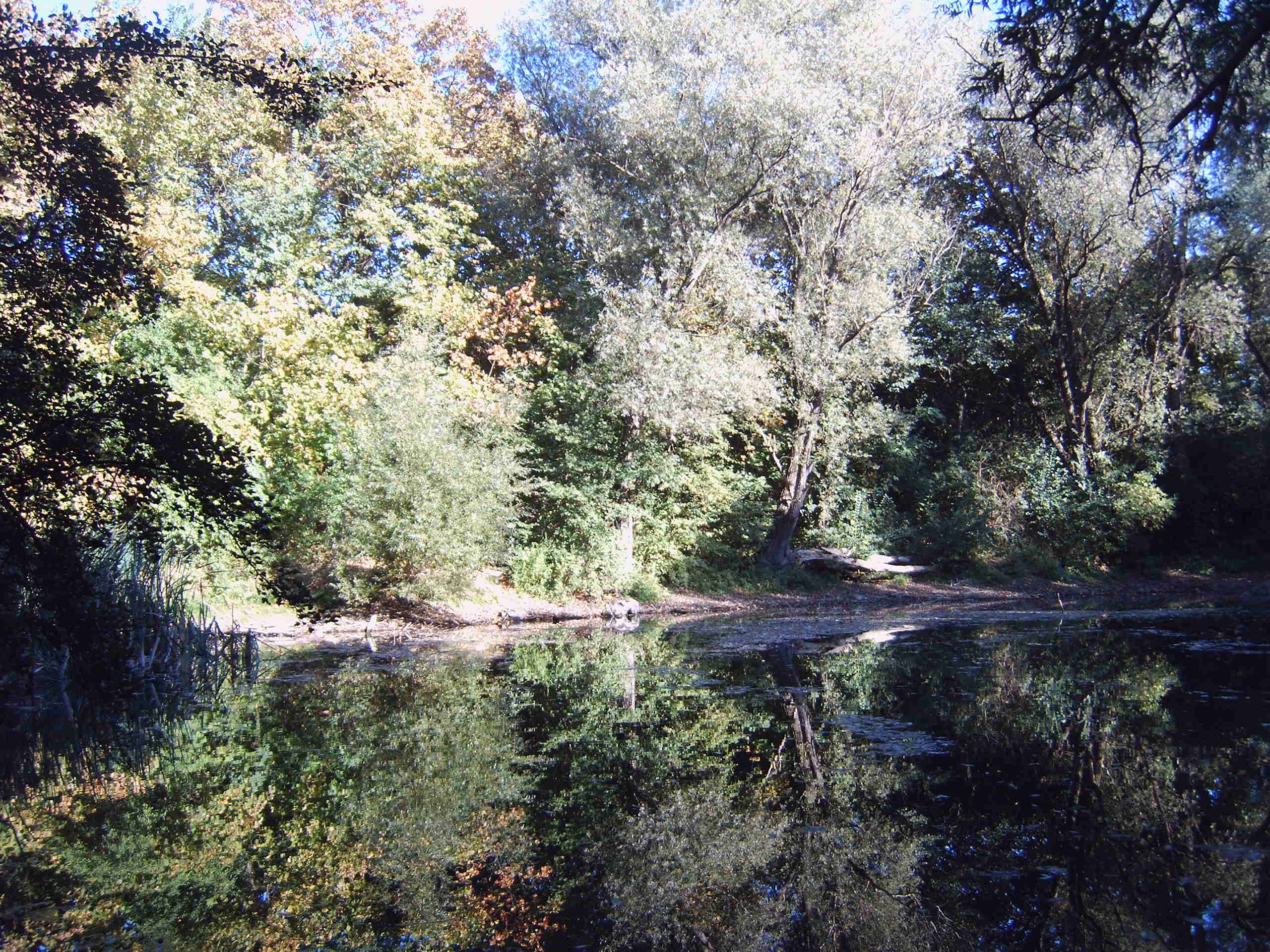 Benneckenbecker Steinbruch in Magdeburg, Sachsen-Anhalt, Deutschland Bild aufgenommen am 22.9.2006